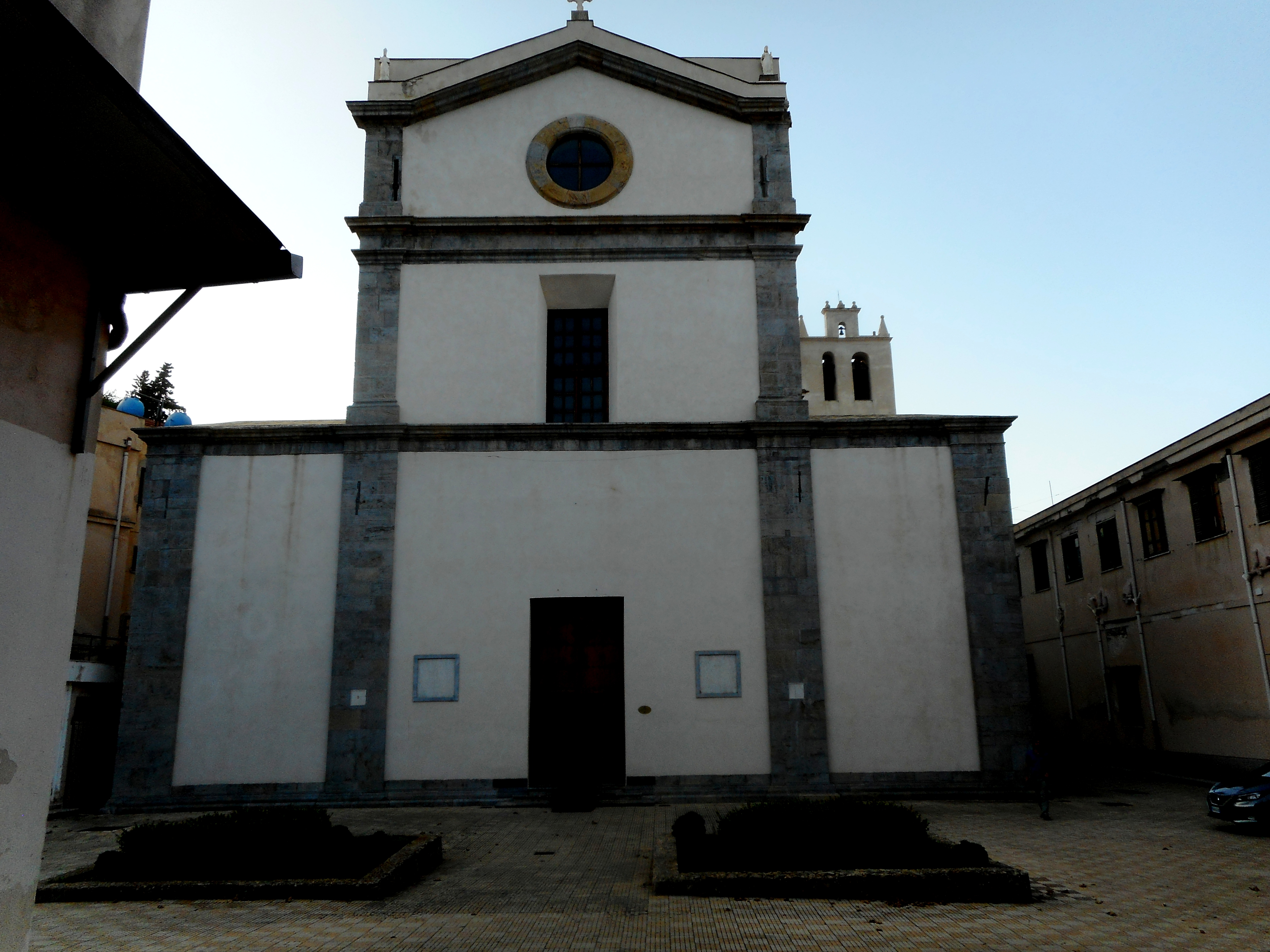 Facciate della chiesa abbaziale di San Martino delle Scale